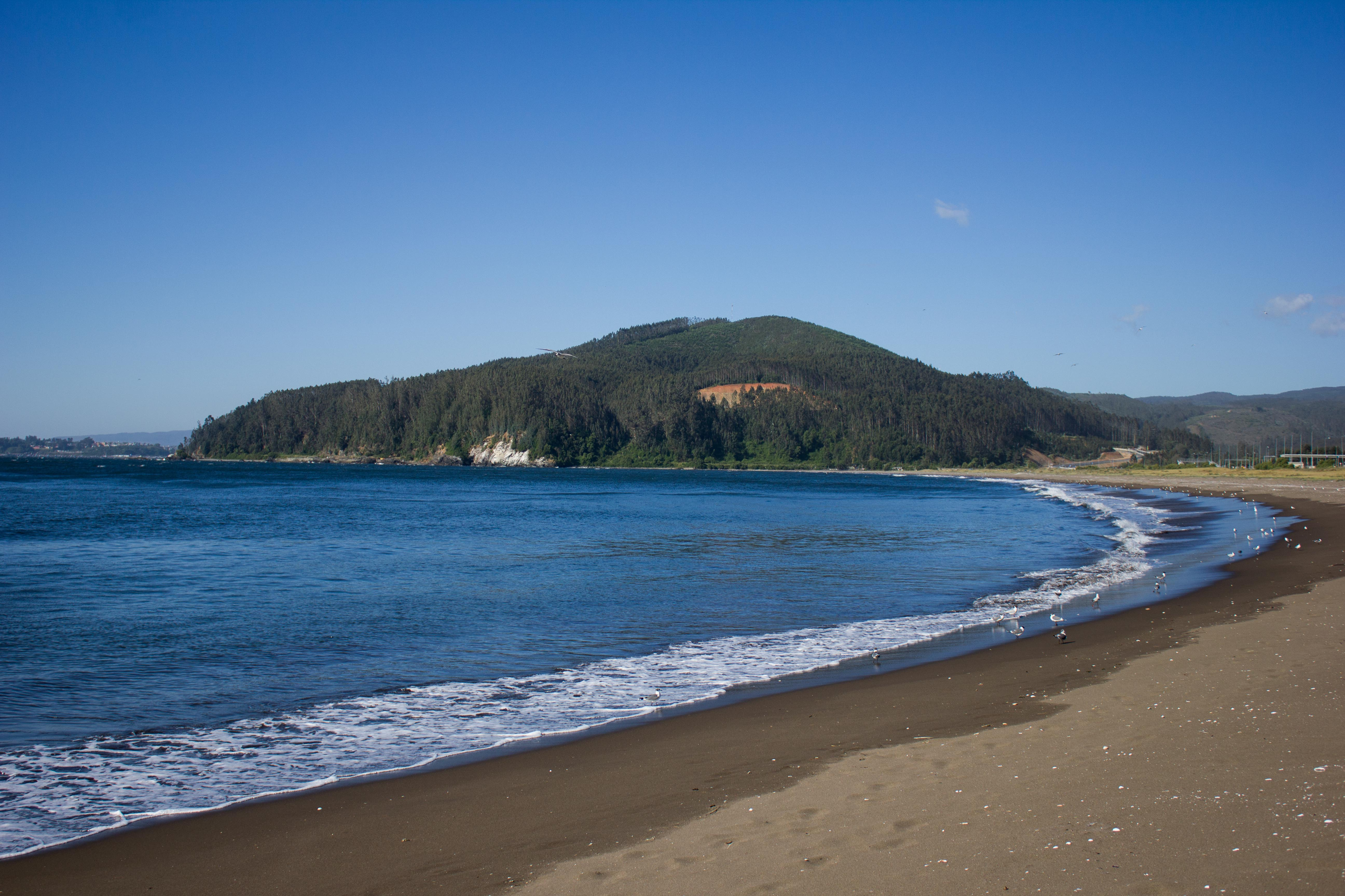 Playa ubicada 12 Km al Sur de Lota. Fotografía tomada por Pablo Hernández Ormeño